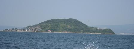 天草諸島の湯島全景